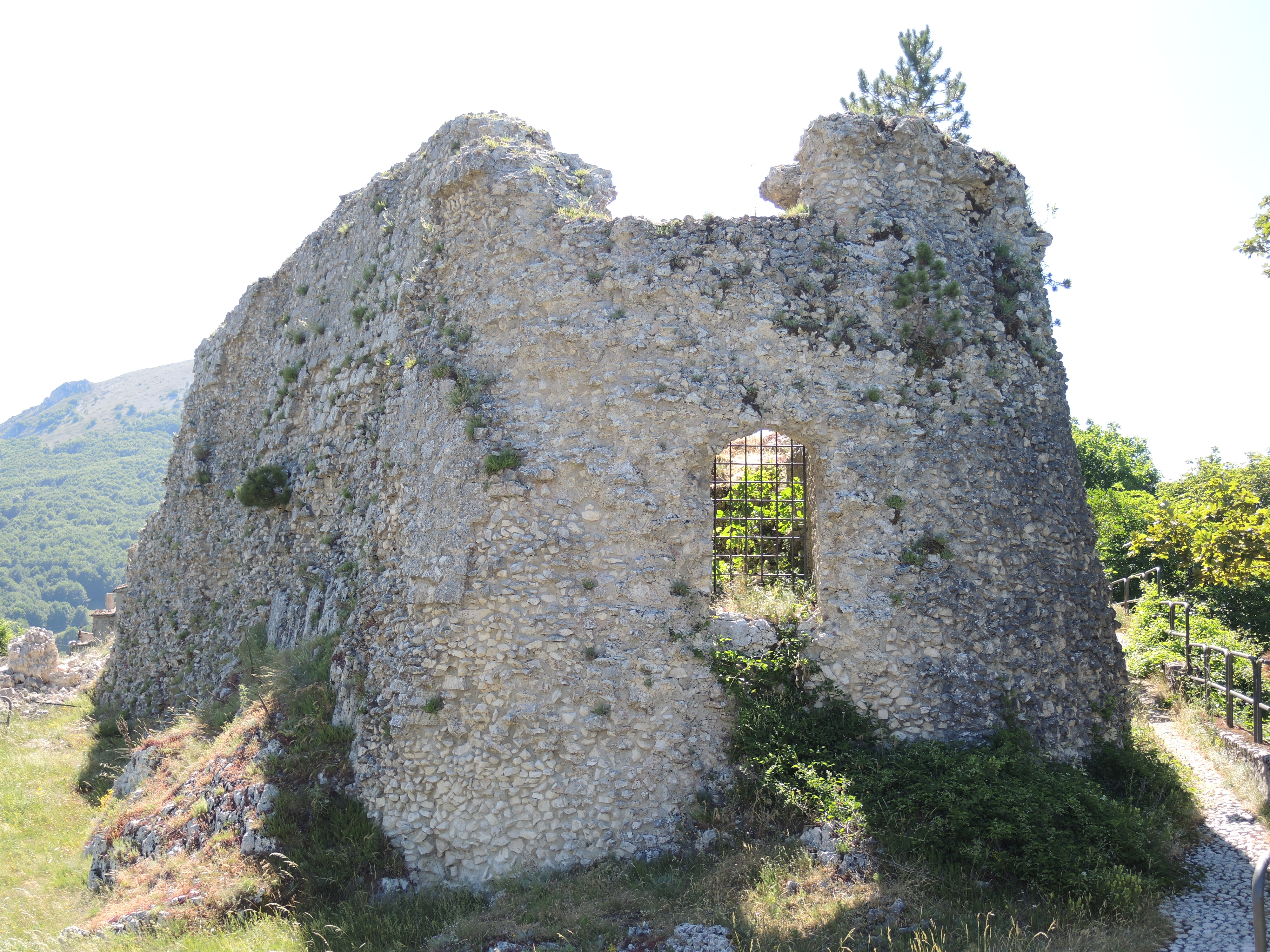 Rocca di Mezzo (AQ): Castello di Rovere